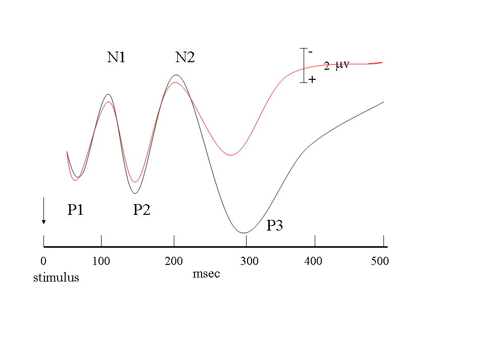 Event-related_potential. Eigen tekening. Schematische afbeelding van enkele late ERP-componenten (P2, N2, P3) in een passieve (rood) en actieve (zwart) conditie.